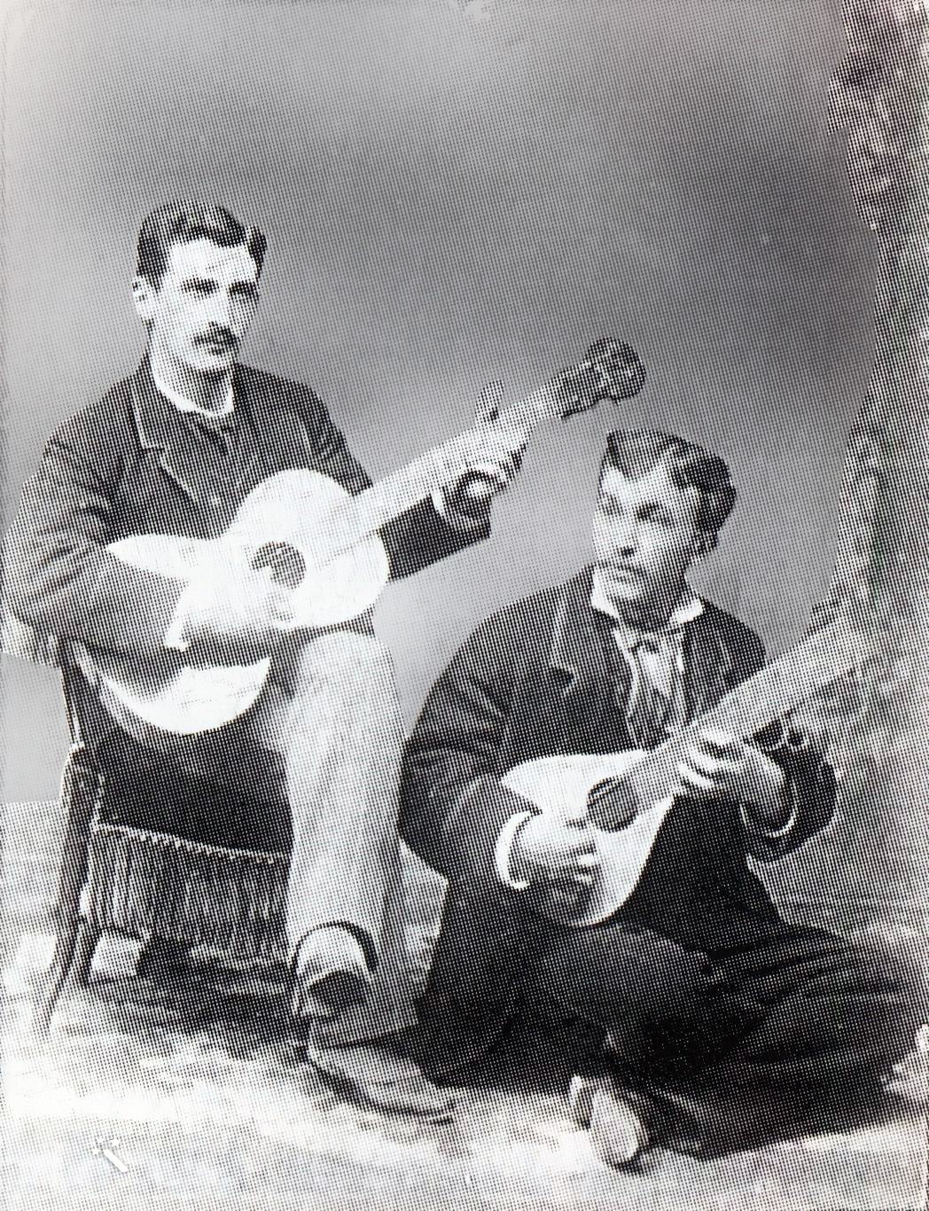 Retrato de Juansarás y Garraus, dos navarros que formaron parte de Los Tres Bemoles pero que antes formaron en París un dío de guitarra y laúd.